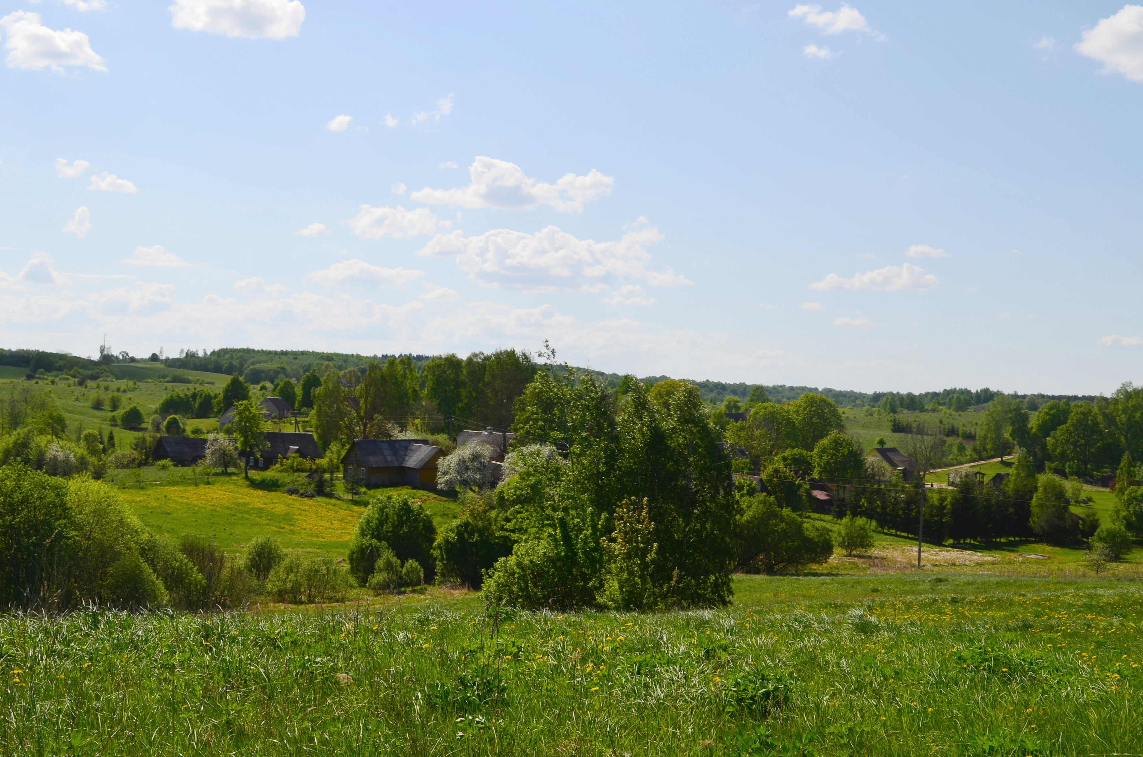 Gėliogaliai, Balninkų sen., Molėtų raj.